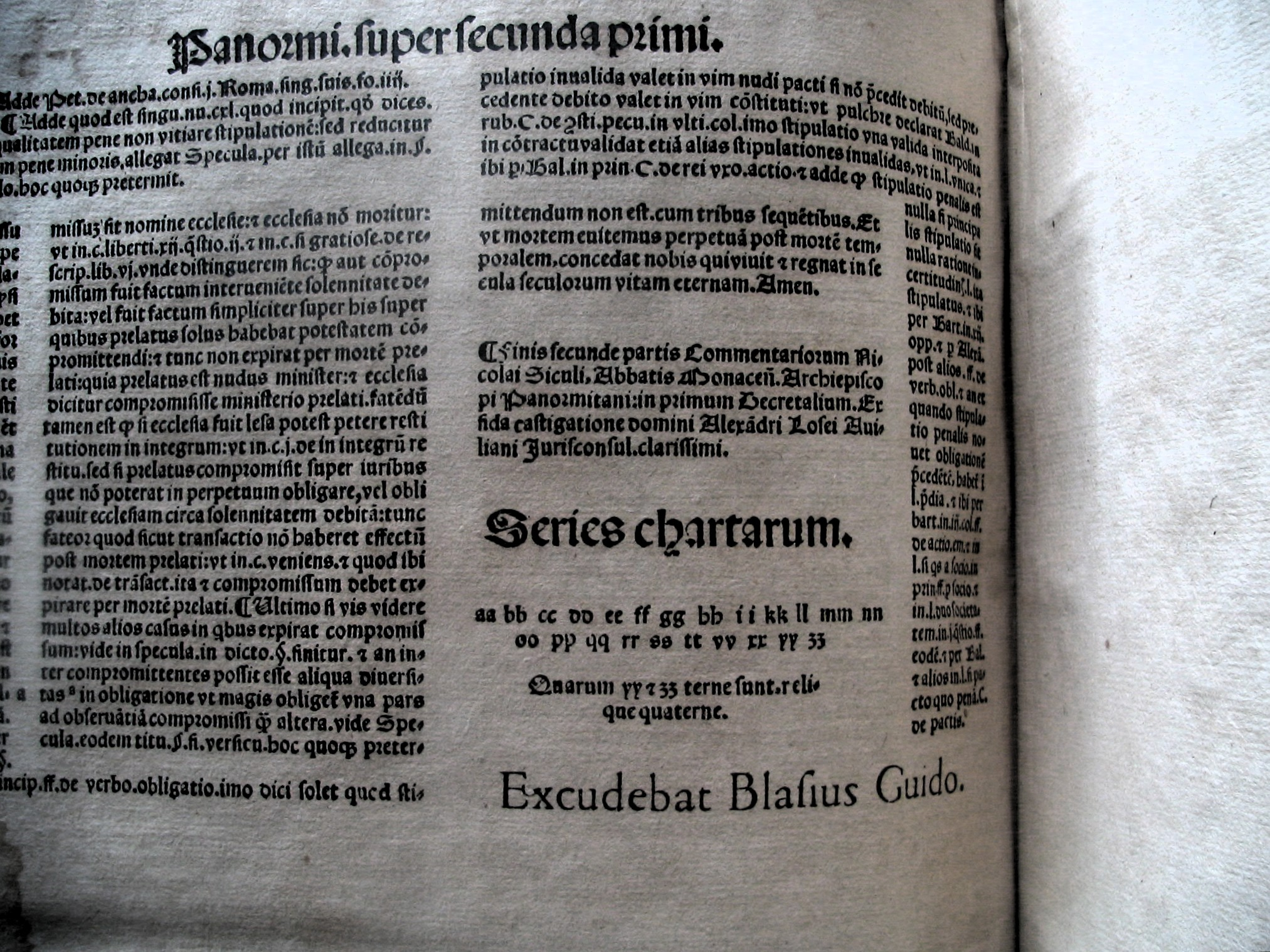 Registro de pliegos de Panormitani prima in primum (secundumquintum) Decretalium, Lyon, 1555. OCLC: 606504806